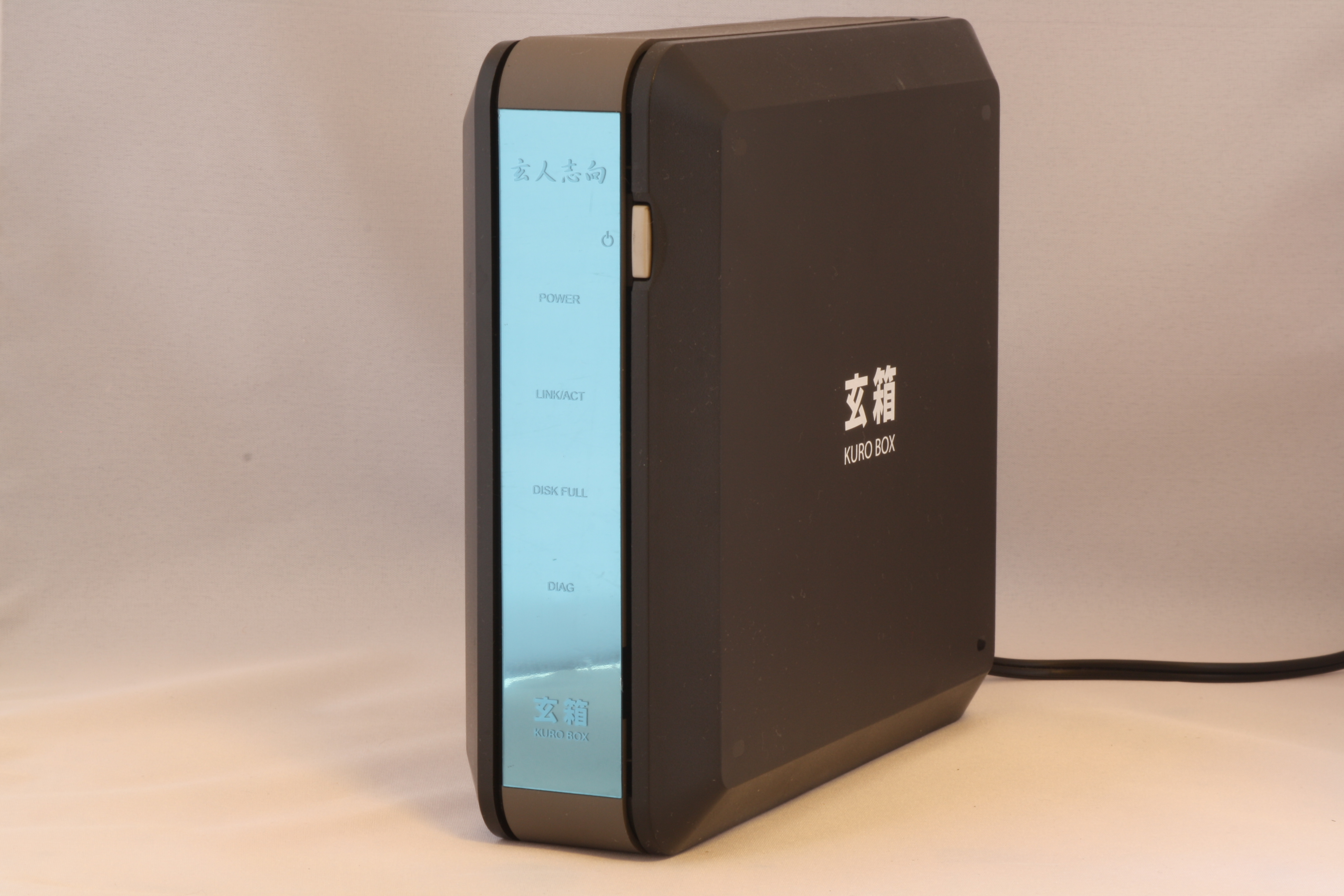 Buffalo 玄箱